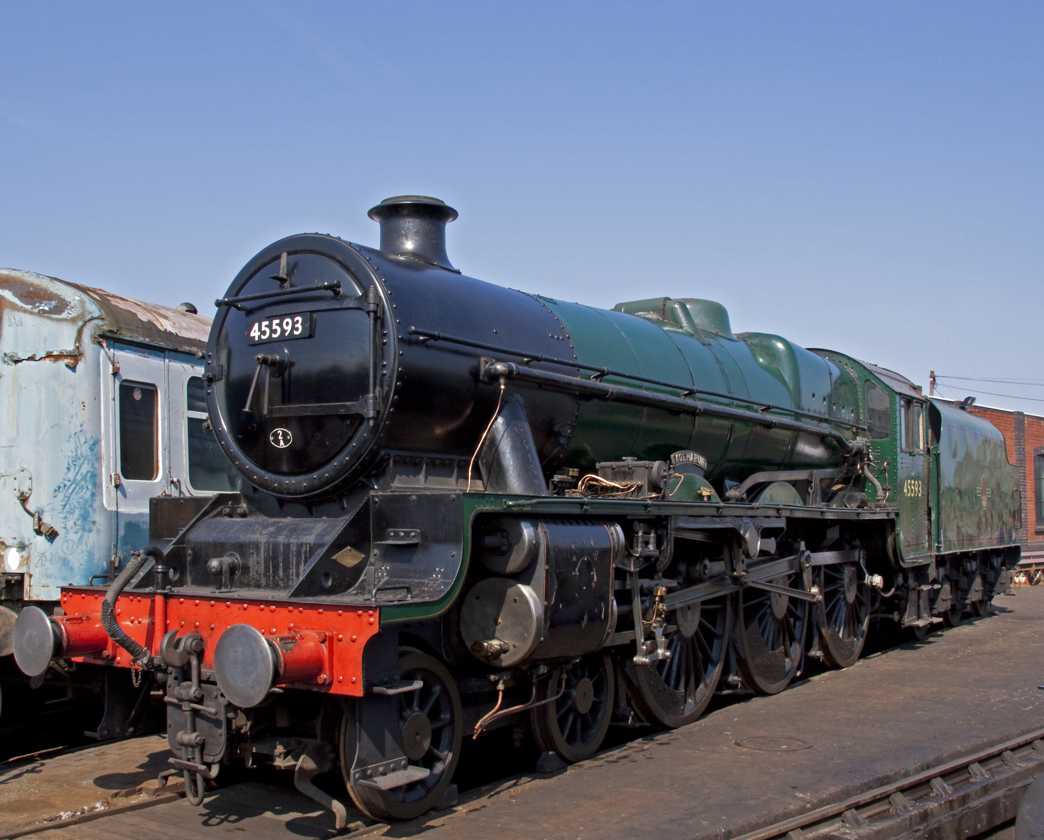 Kolhapur